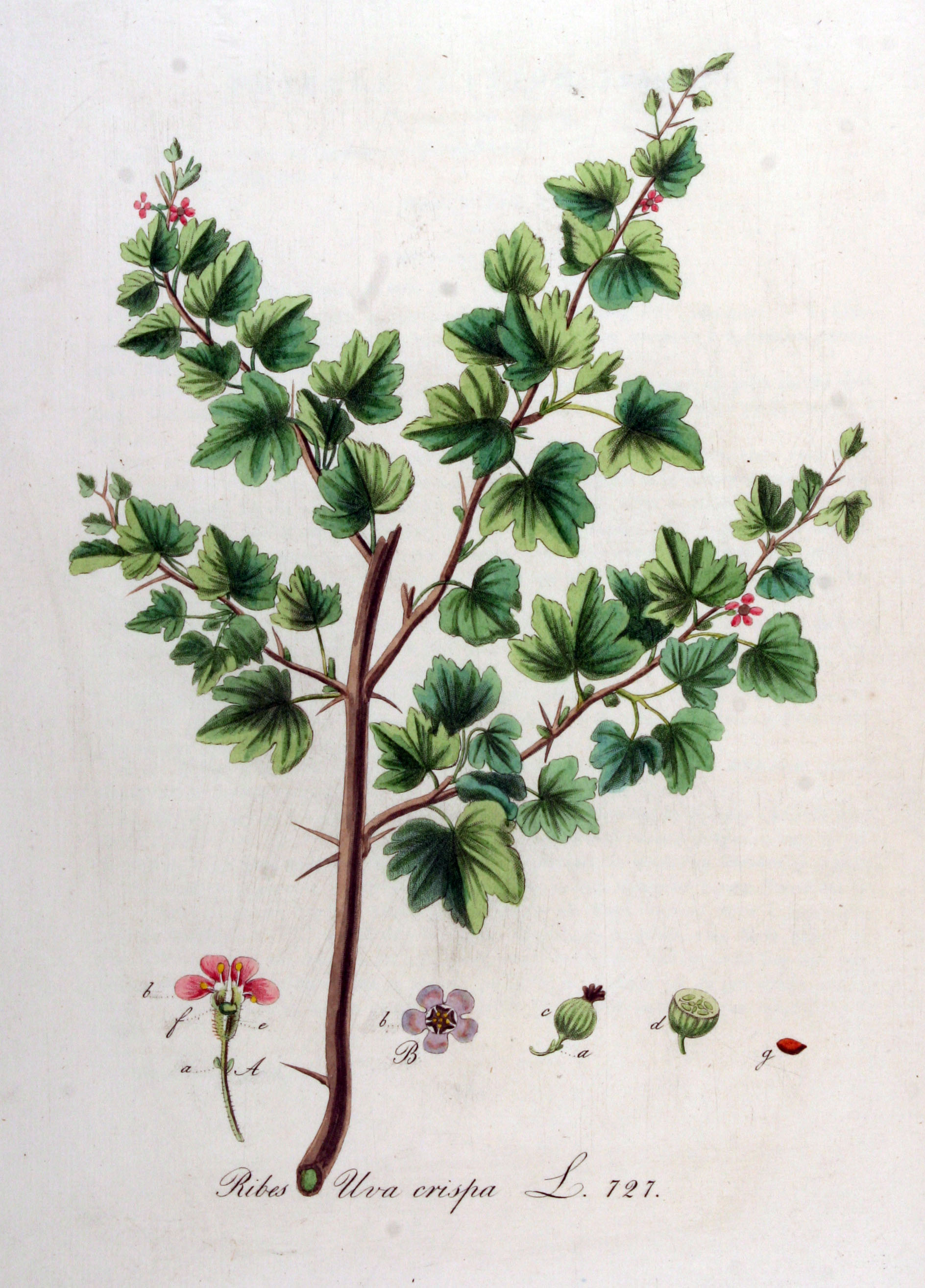 Ribes uva-crispa L.